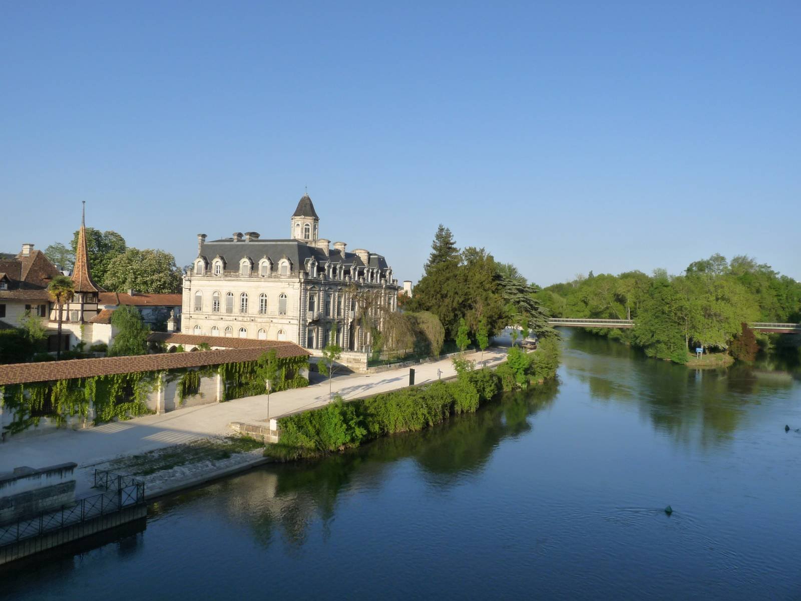 La Charente et St-Cybard, vue du pont de Saintes à Angoulême, France; une partie du musée de la bande dessinée à gauche